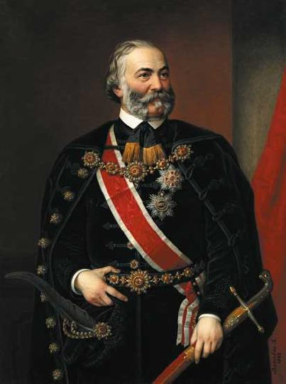 Gorove István politikus, miniszter, közgazdász, valóságos belső titkos tanácsos, a Magyar Tudományos Akadémia tagja.